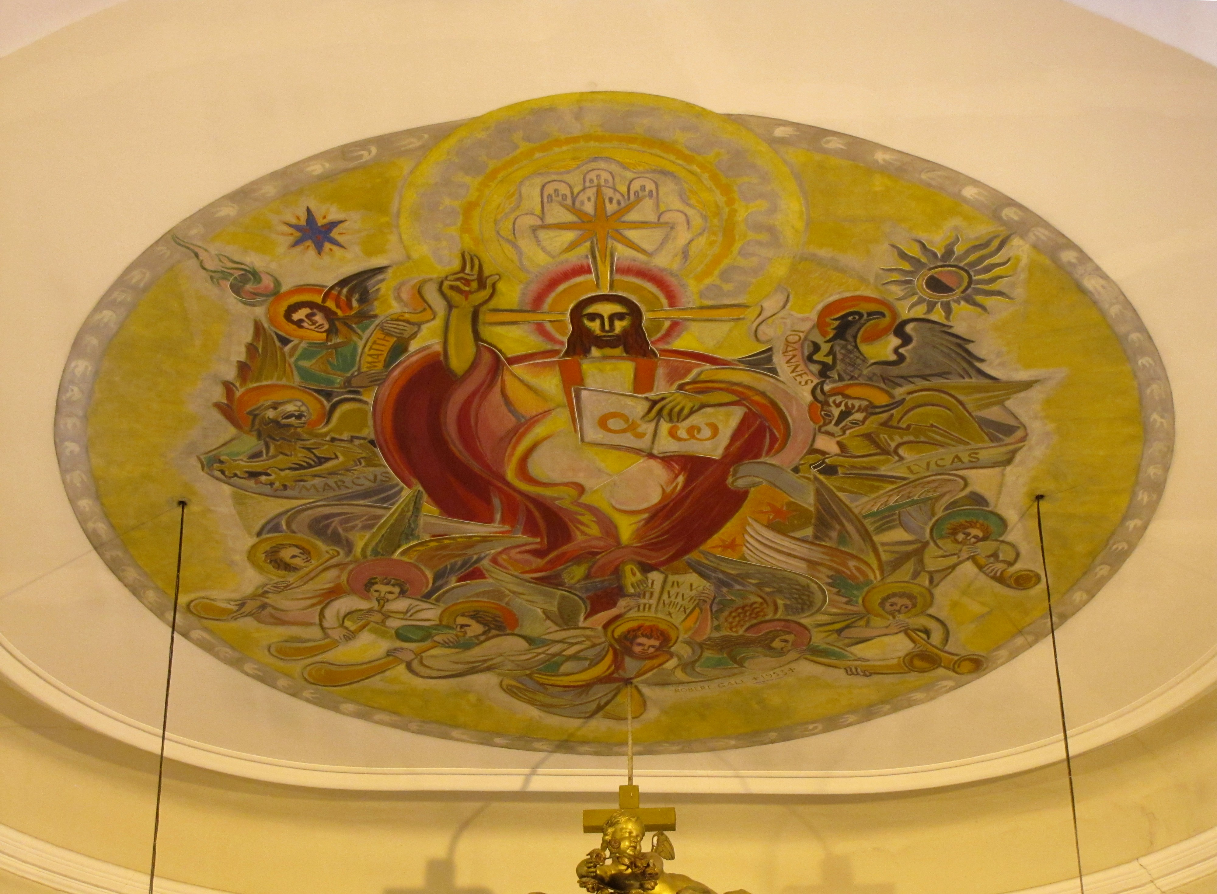 Alsace, Bas-Rhin, Weyersheim, Église Saint-Michel (PA00085235, IA00119652).